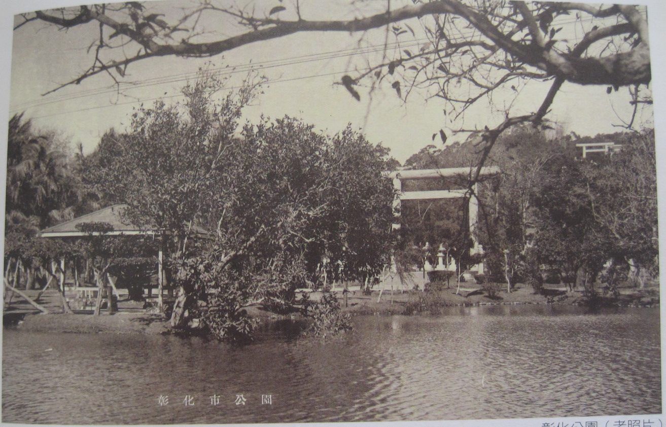 彰化市公園一景，圖中鳥居為彰化神社。翻拍自《八卦山史蹟文物展〈圖錄〉》（1999），原件為公開超過50年的照片，且依著作權法的製版權相關規定屆滿十年後製版權消滅，故已進入公眾領域。